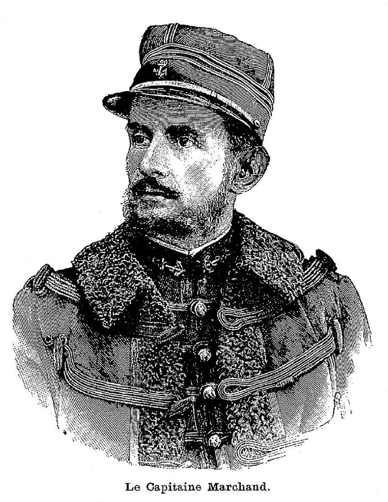 Le capitaine Marchand en 1898 (dessin anonyme paru en première page du "Journal du Dimanche" du 9 octobre 1898)